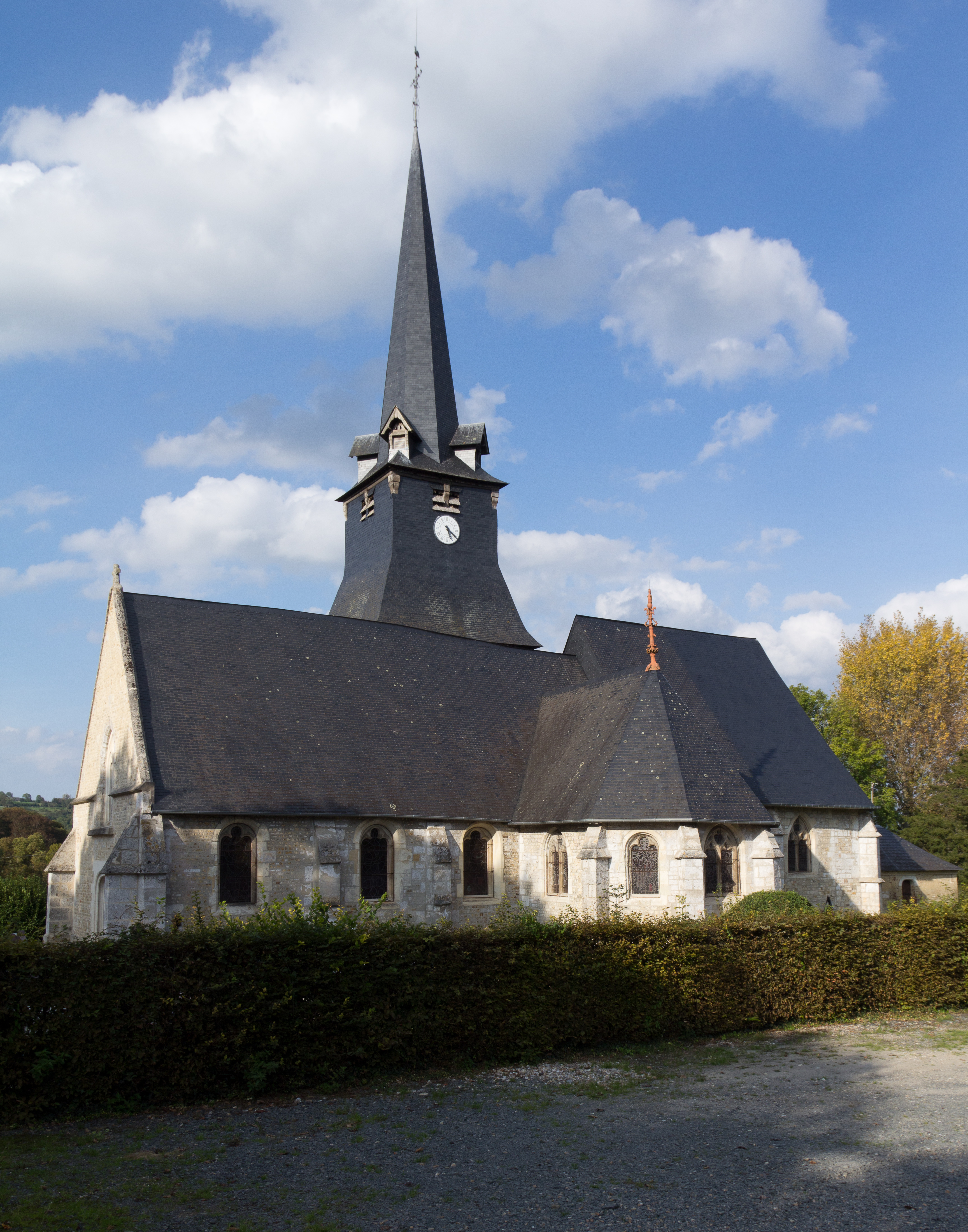 Vue sud de l'église Saint-Julien de Saint-Julien-sur-Calonne. . Object location49° 17′ 27.79″ N, 0° 13′ 37.31″ E